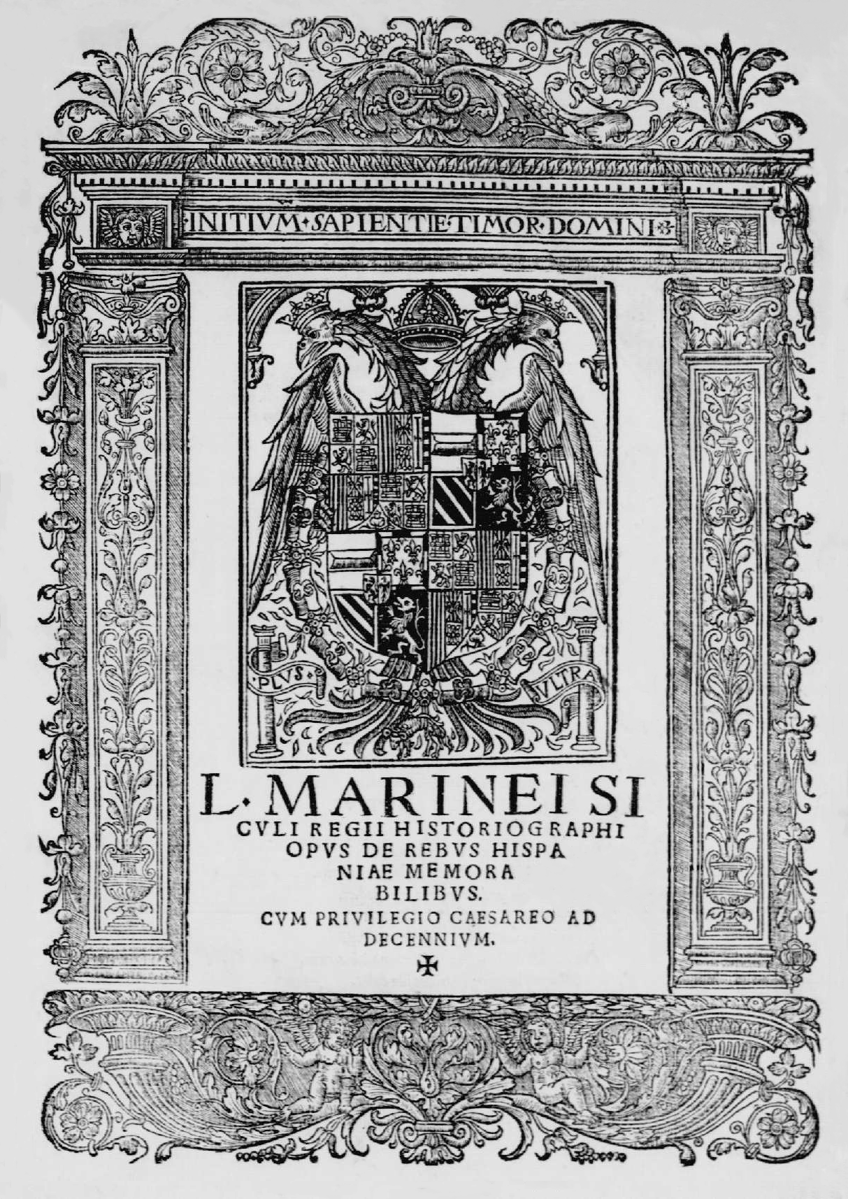 Portada del libro De rebus Hispaniae memorabilibus de Lucio Marineo Siculo. Impreso en Alcalá de Henares por Miguel de Eguía, el 14 de julio de 1530.